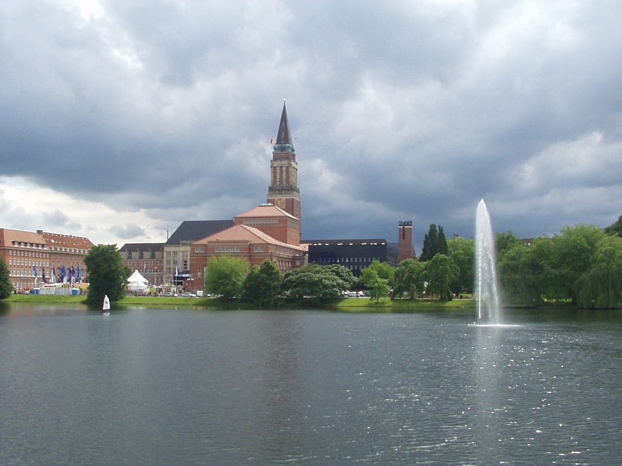 Kieler Innenstadt: „Kleiner Kiel“ mit Opernhaus und Rathausturm